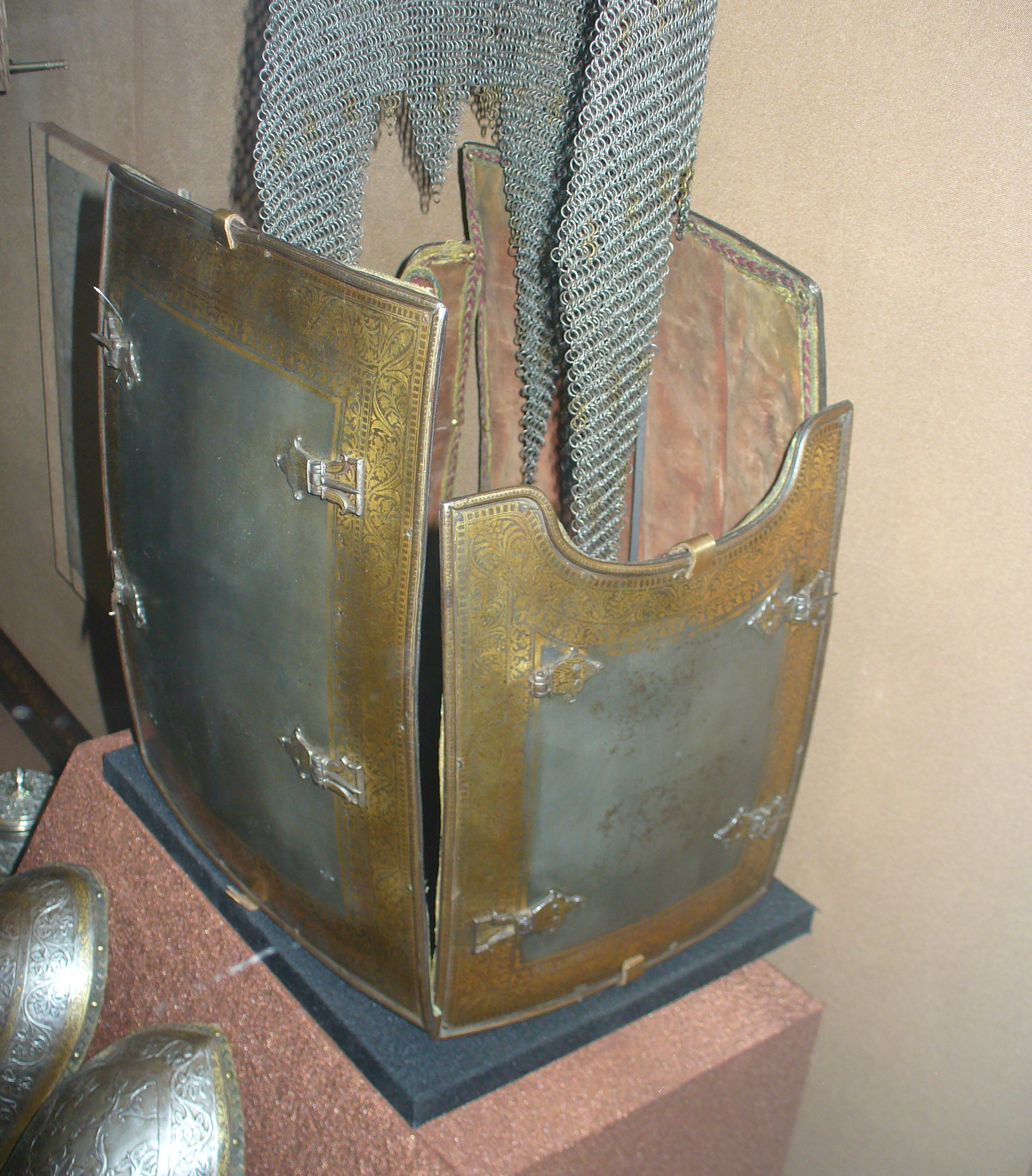 Зерцало чарайна, Иран, XVII век.